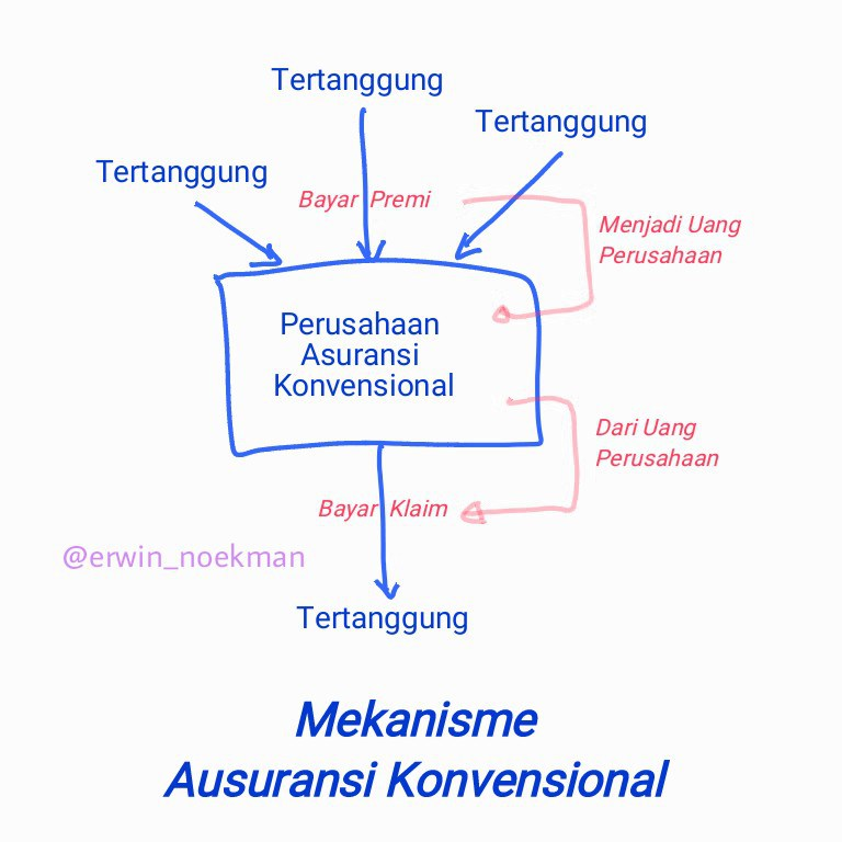 Mekanisme Asuransi (Konvensional)